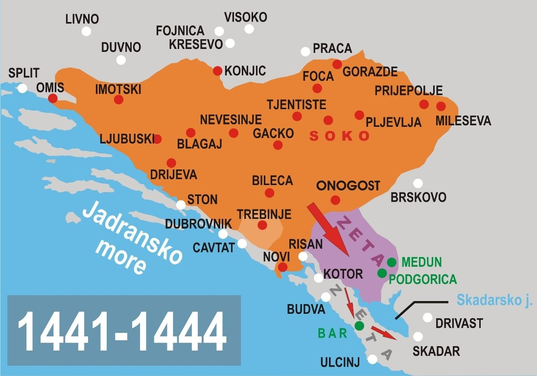 Ratom u Zeti (1441-1444. godine) Vojodstvu Stefana Vukčića Kosače pripojena je Gornja Zeta sa trgom Podgorica i tvrđavom Medun. Osvojen je grad Bar, sa tvrđavom (danas Stari Bar) u Donjoj Zeti. (Извор: Редакција за историју ЦГ –„Историја Црне Горе“, књига II-2, Титоград, 1970.)